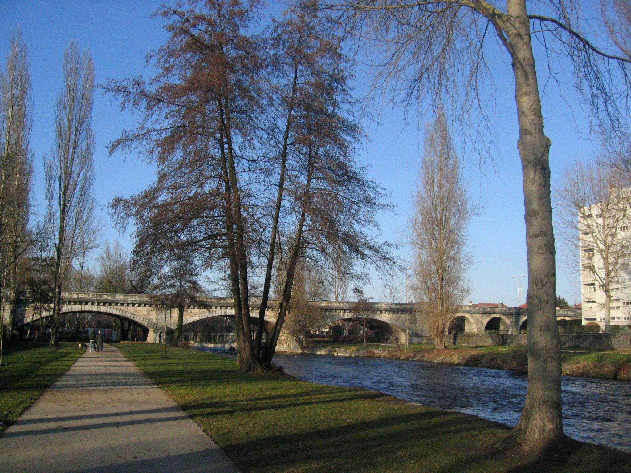 Au bas de la résidence des rives de l'Adour à Tarbes, le fleuve qui cheminera jusqu'à Bayonne a encore bien du temps devant lui.